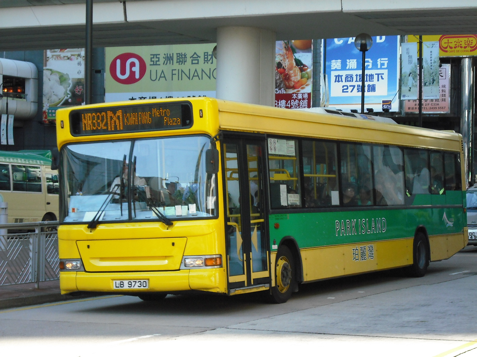 珀麗灣居民巴士NR332線，攝於葵芳地鐵站對出巴士站